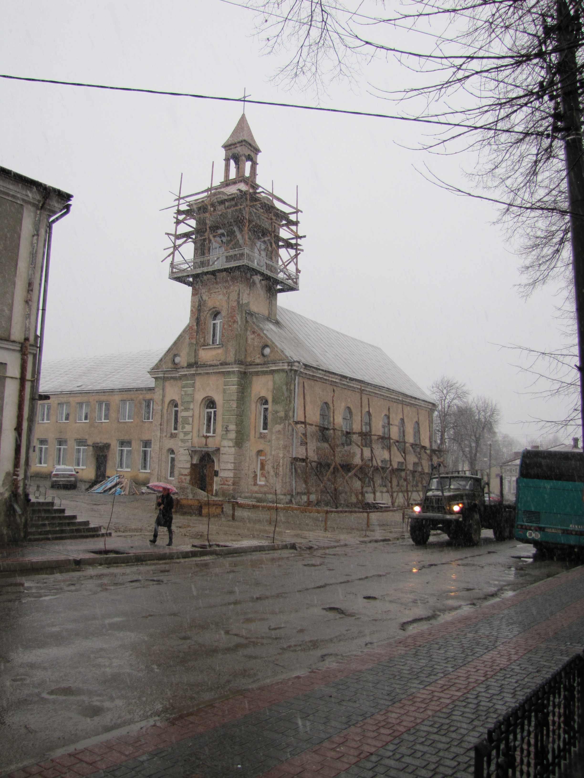 Kościół w Chyrowie